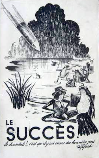 Pierre Bonny caricaturé sous les traits du policier Rossard dans l'ouvrage satirique signé Tapfort (préf. Jacques Vernières), Le succès. Le scandale!… C'est qu'il y ait encore des honnêtes gens, Gulliver, 1935, 280 p.